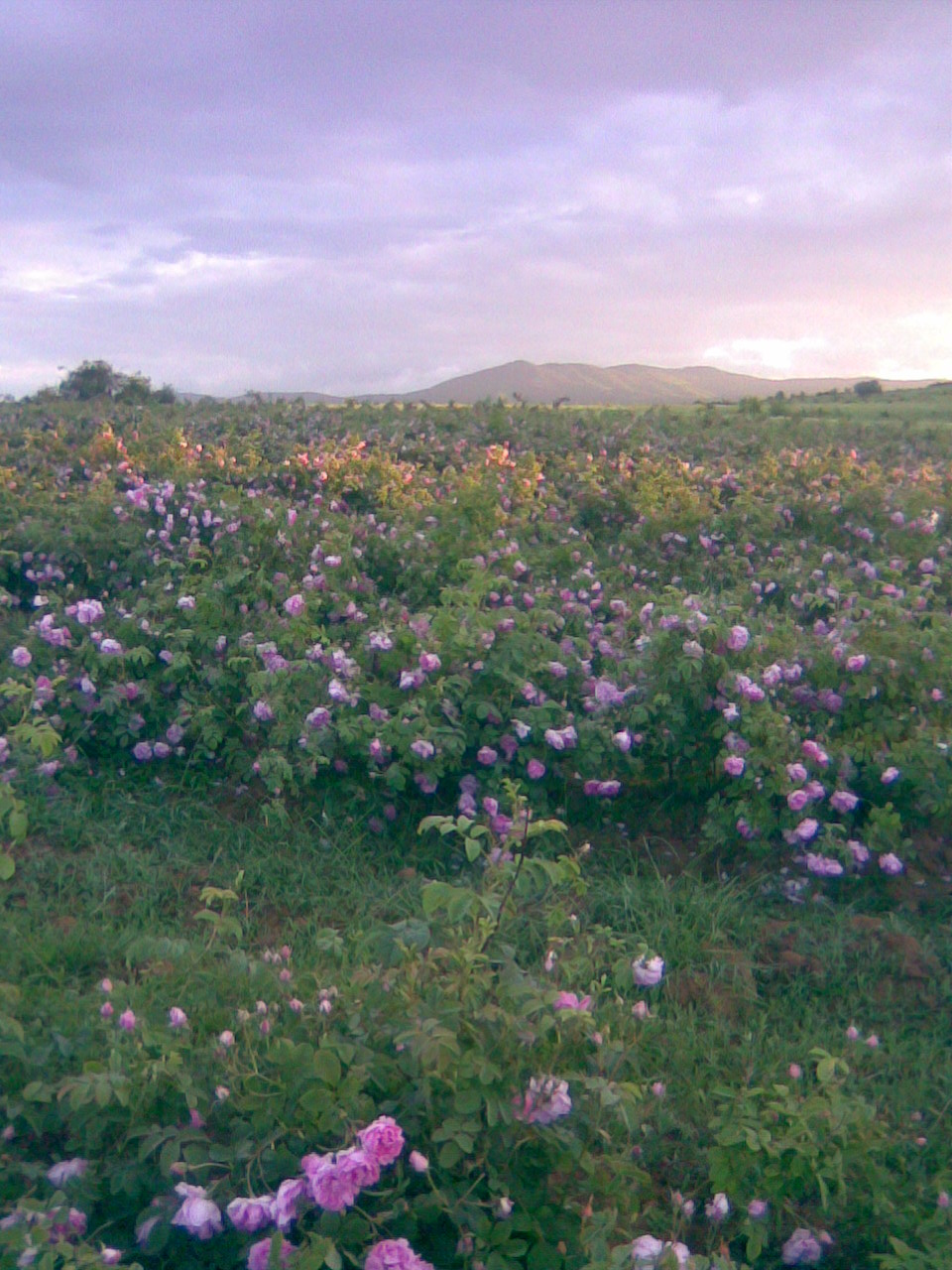 Маслодайните рози край село Върбен,община Брезово, Област Пловдив.